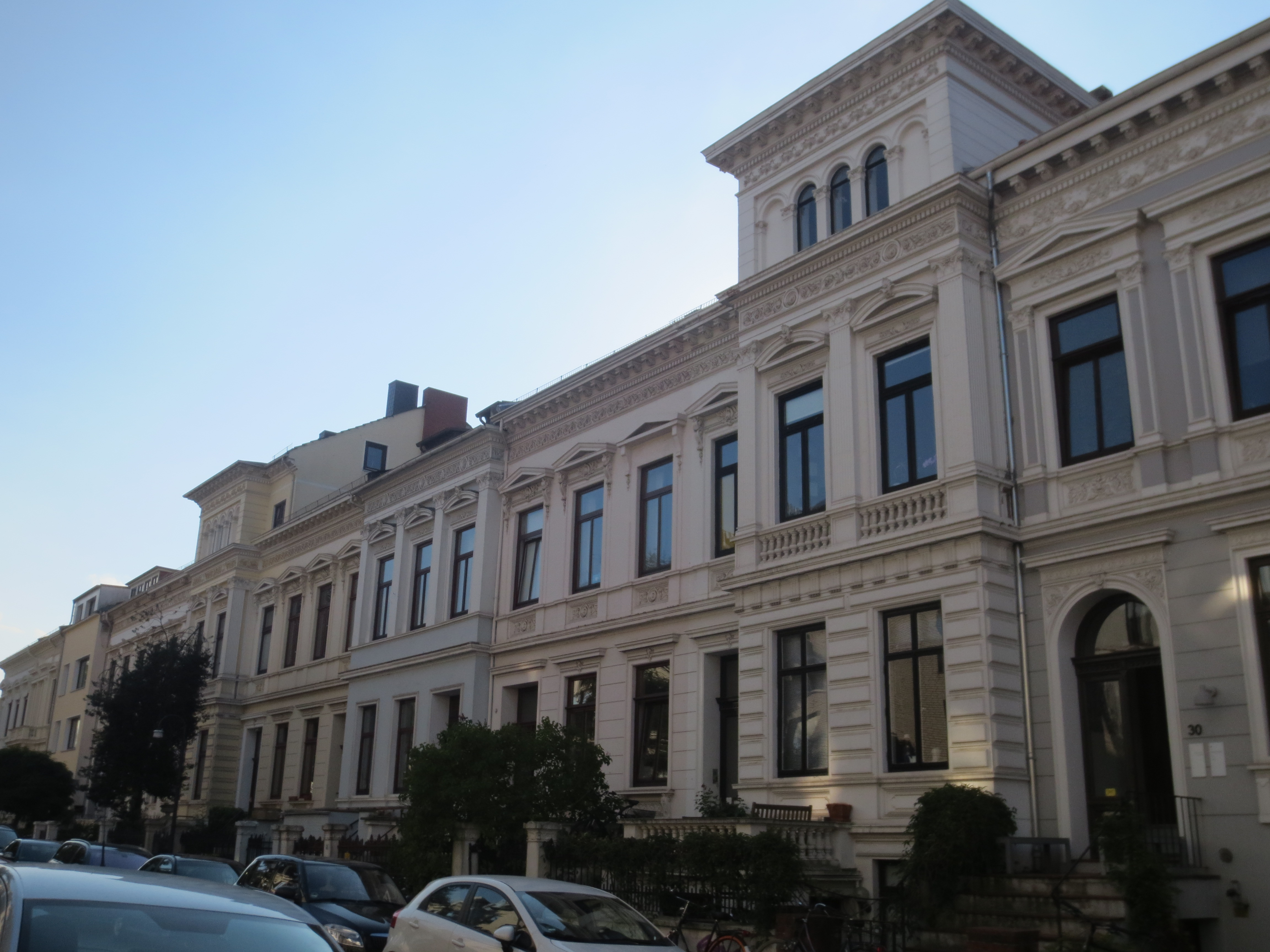 Wohnhausgruppe in Bremen, Keplerstraße 9Die Denkmalgruppe ist ein geschütztes Kulturdenkmal in der Freien Hansestadt Bremen, mit der Nr. 1411 beim Landesamt für Denkmalpflege registriert.